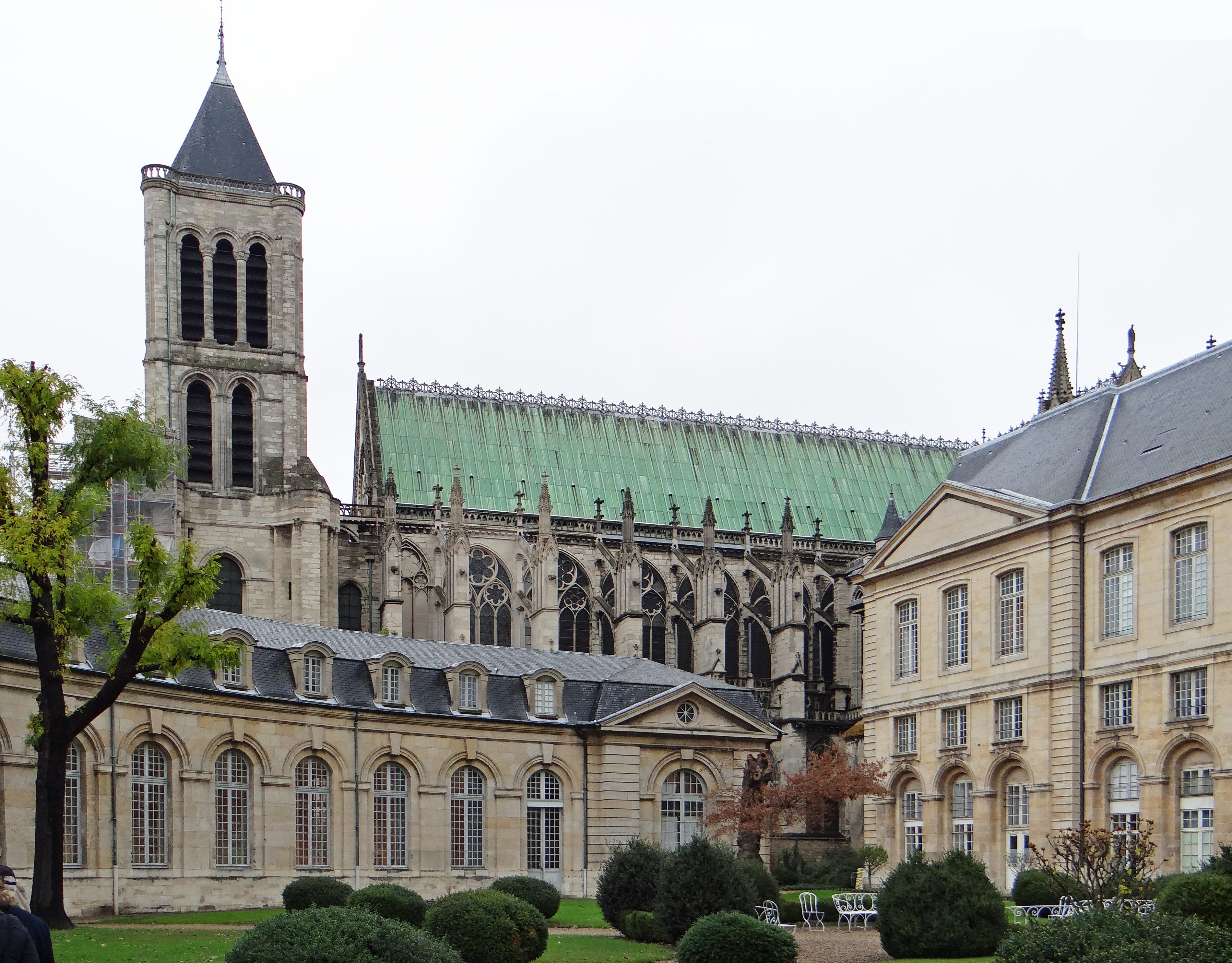 Saint-Denis - Basilique Saint-Denis vue de la cour d'entrée de l'abbaye